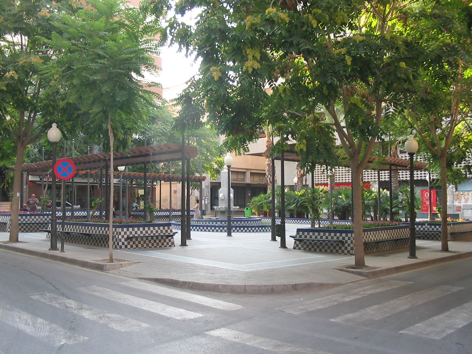 Fotografía de la Plaza Sagasta de Elda, Alicante, España.